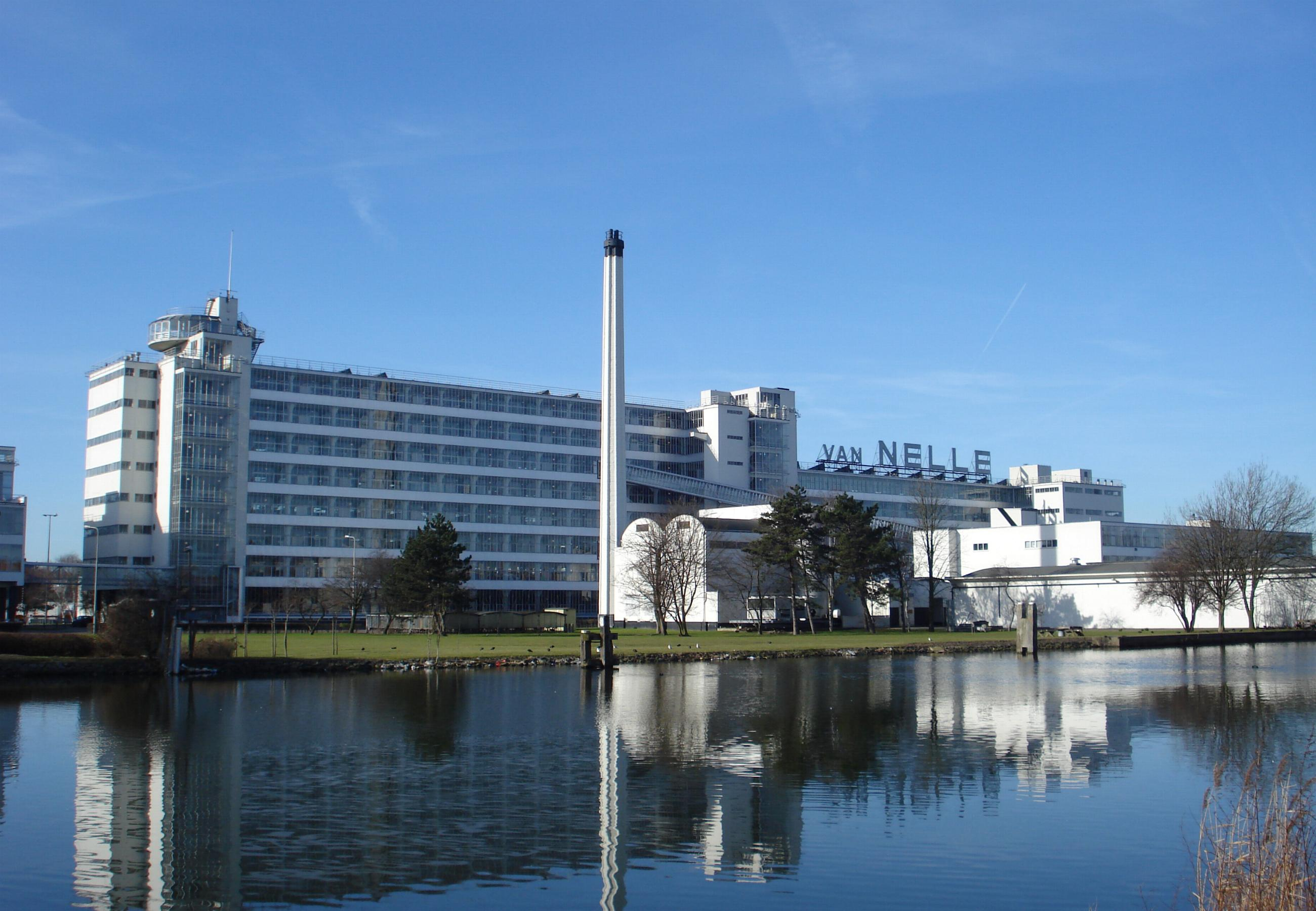 Rotterdam, Van Nelle fabrieksterrein. Rijksmonument.